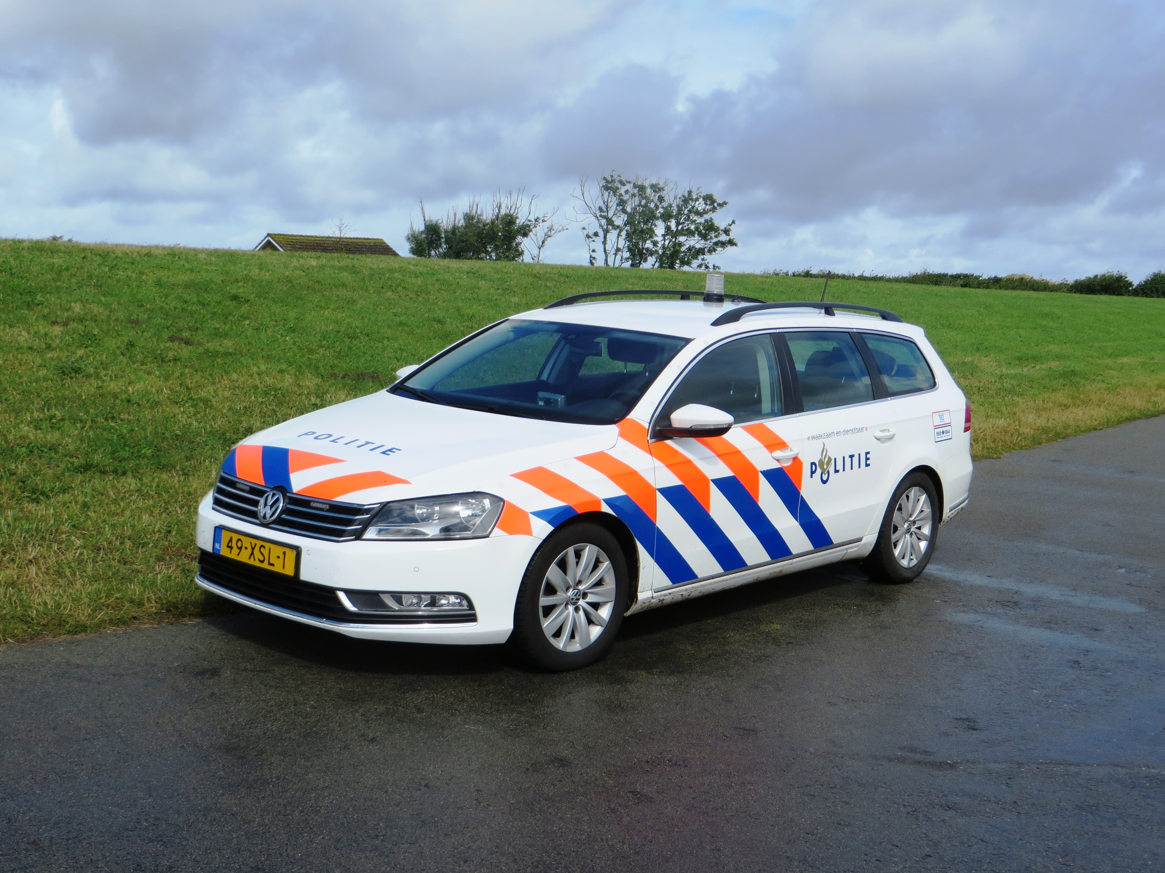 Politie auto's op Terschelling